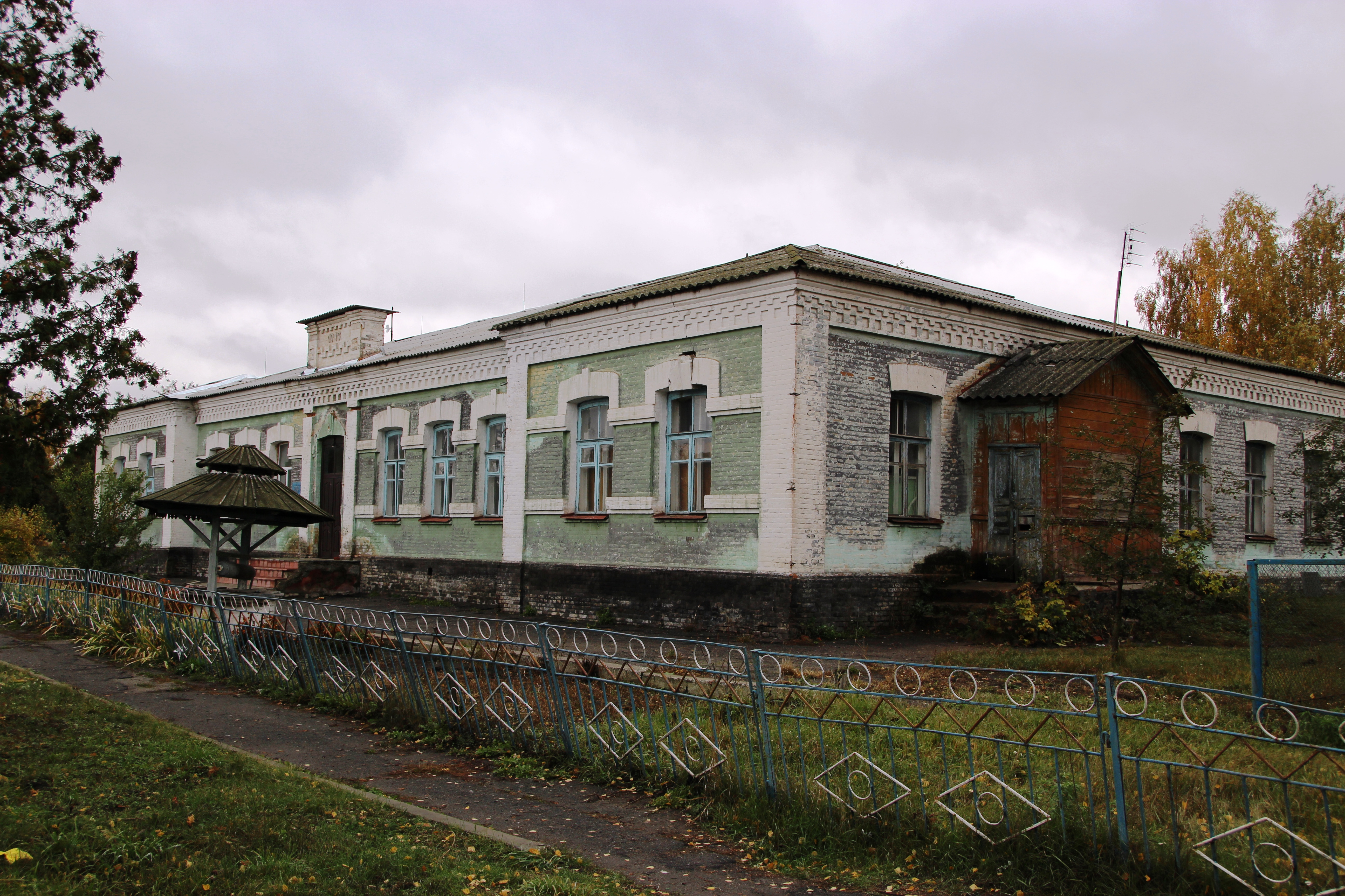 село Біловод, Роменський район, земська школа